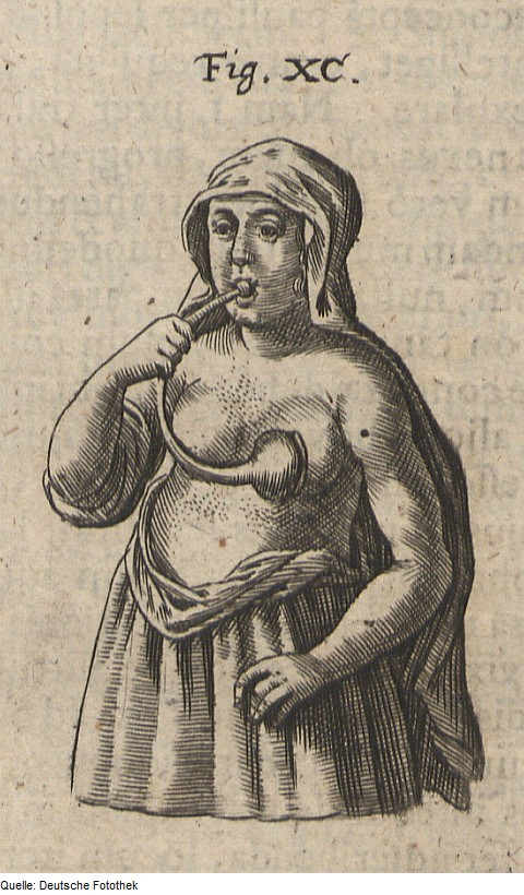 Original image description from the Deutsche Fotothek Physik & Hydrostatik & Wasserkunst